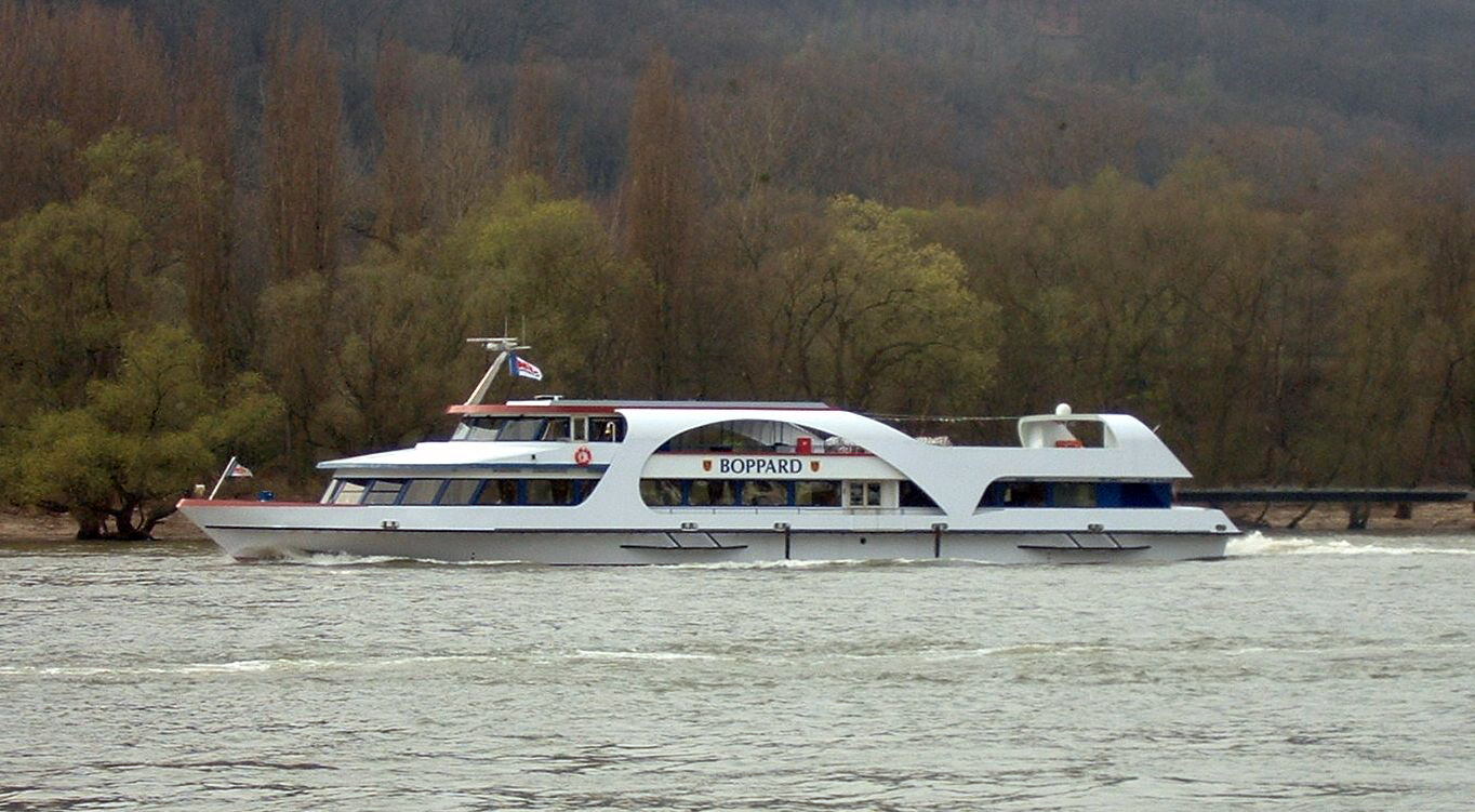 Personenschiff Boppard